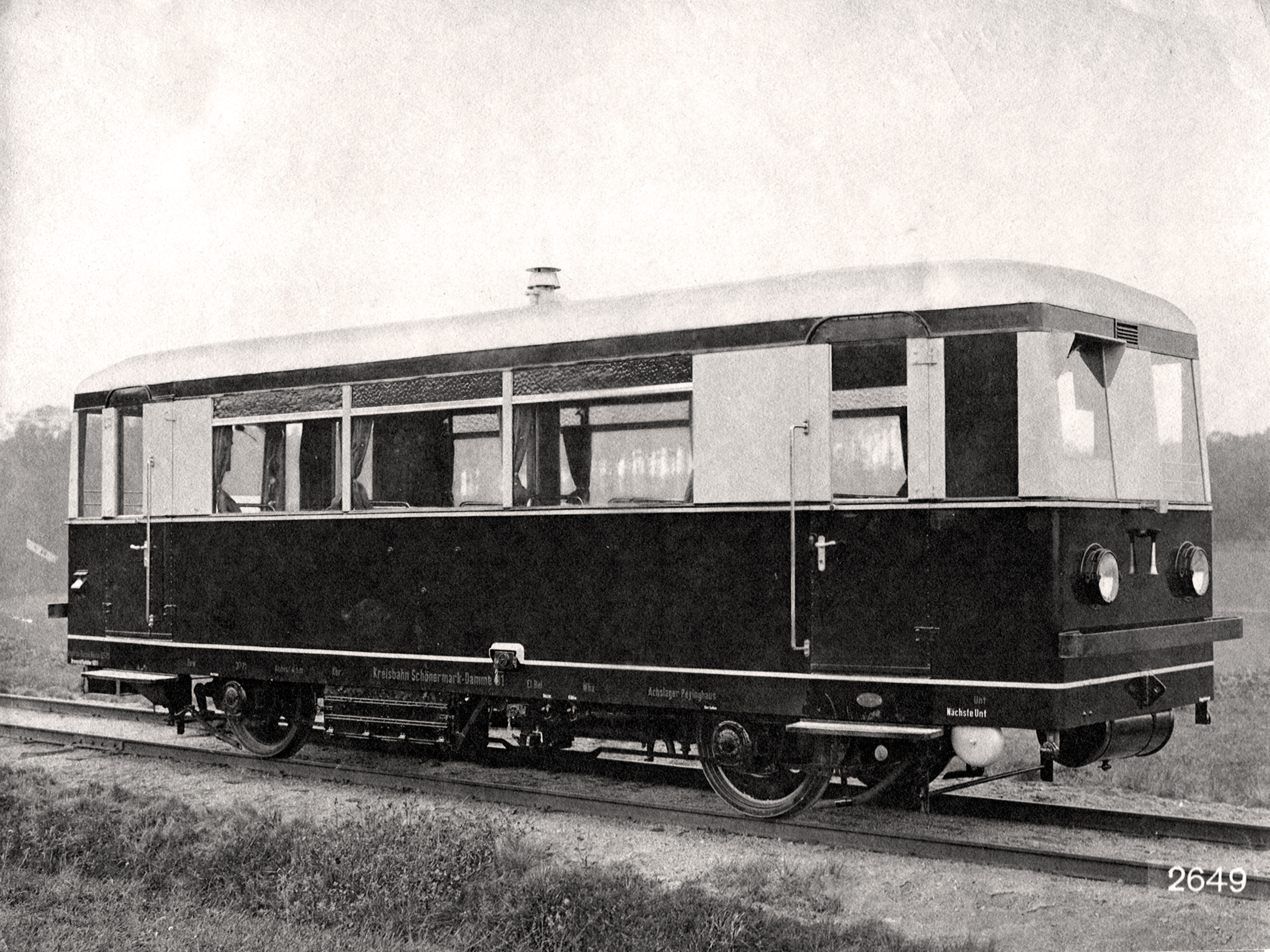 Werkfoto der WUMAG von dem Triebwagen "Kreisbahn Schönermark–Damme T 01"